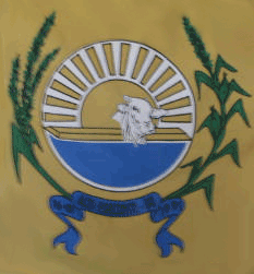 Brasão_Alto_Horizonte_GO.gif